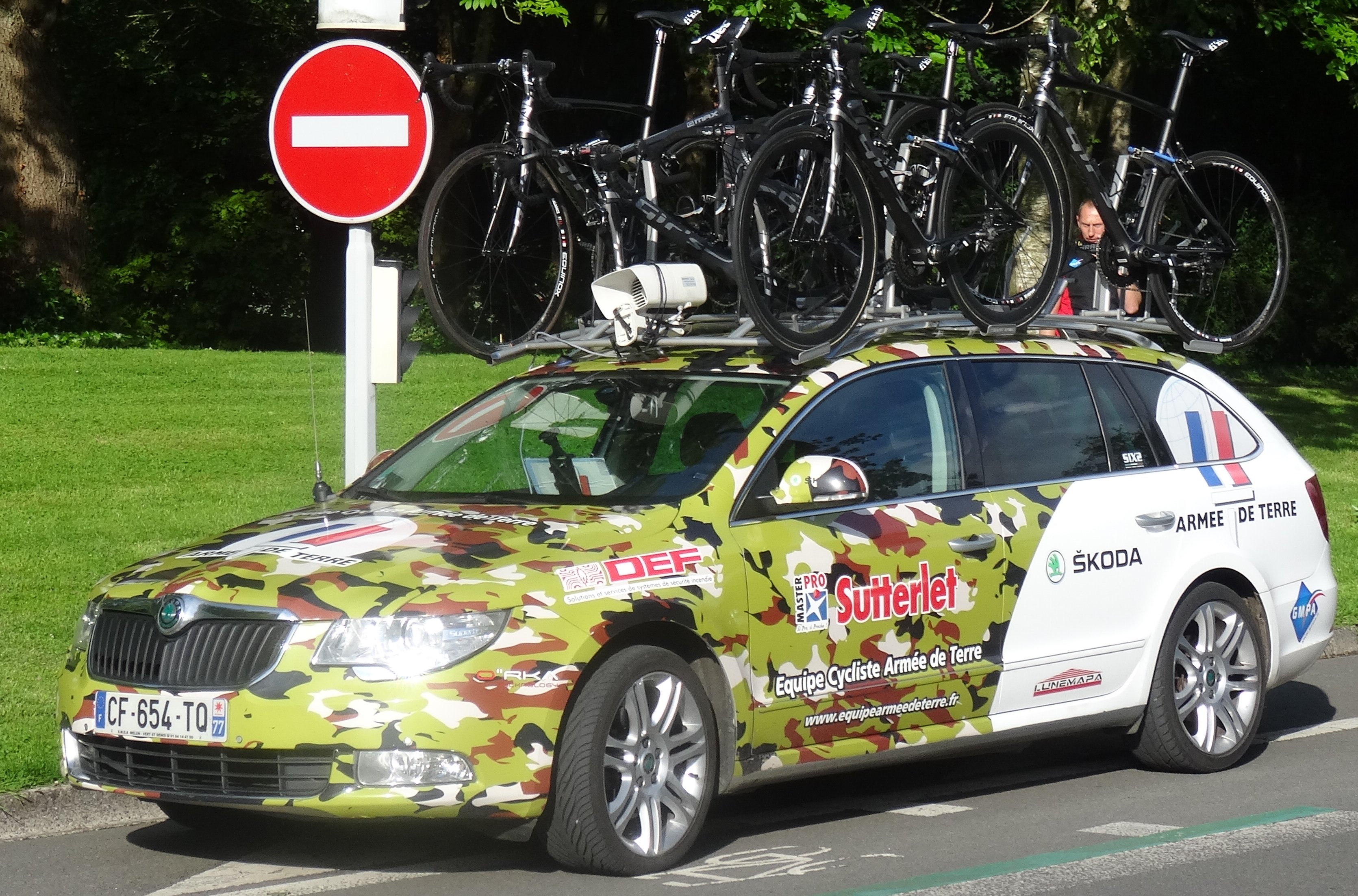 Reportage photographique réalisé le vendredi 23 mai 2014 à l'occasion de l'arrivée de la première étape du Paris-Arras Tour 2014 devant la citadelle d'Arras, Pas-de-Calais, Nord-Pas-de-Calais, France.